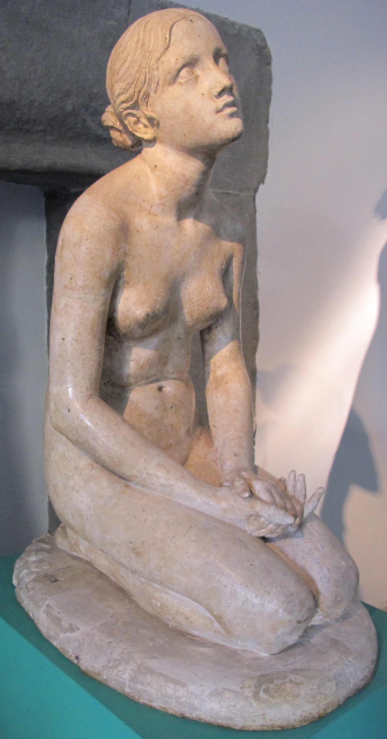 Lorenzo bartolini, la fiducia in dio, modello in gesso,1834